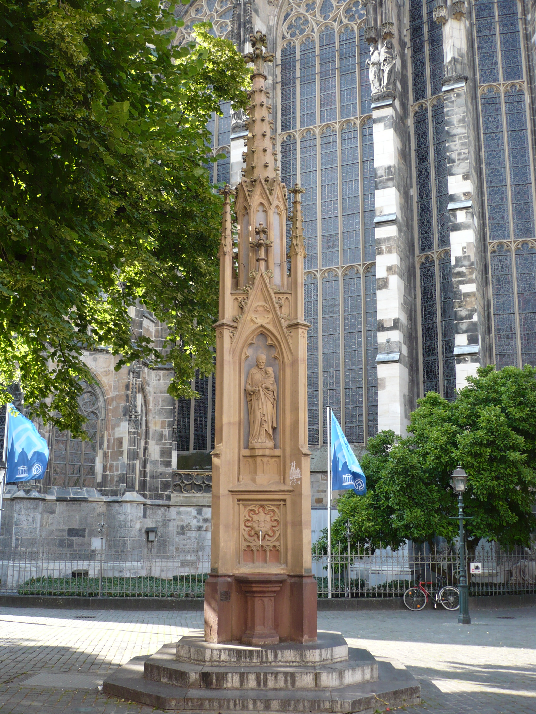 Vinzenzbrunnen auf dem Münsterplatz in Aachen